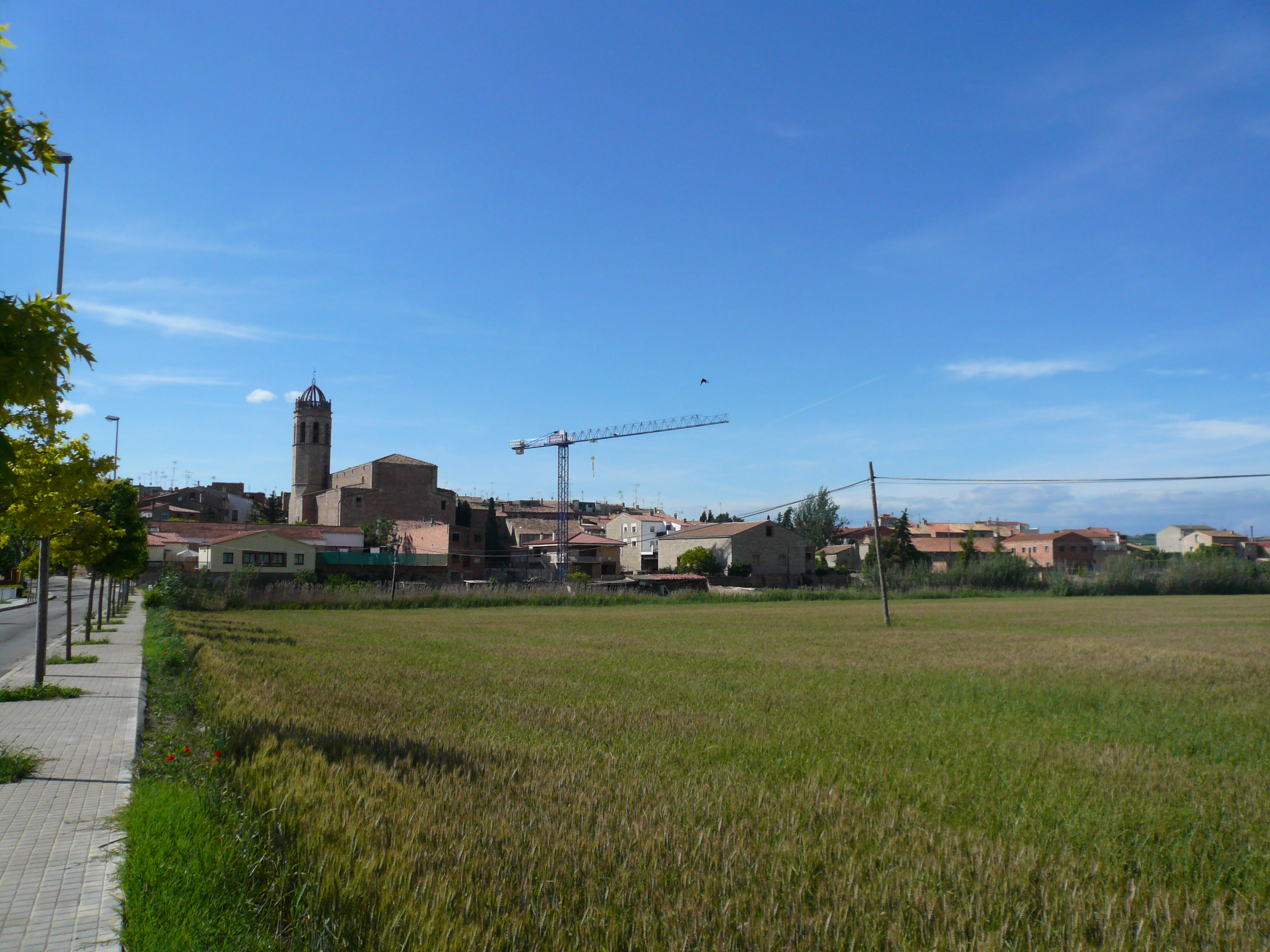 Església parroquial de Santa Maria (els Prats de Rei) Object location41° 42′ 18.58″ N, 1° 32′ 31.93″ E